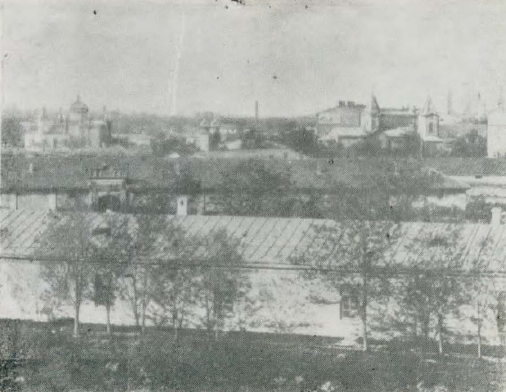 Фото г. Грозный. Ориентировочно начало 20 века. На заднем плане конусные купола армянской церкви (ныне разрушена)